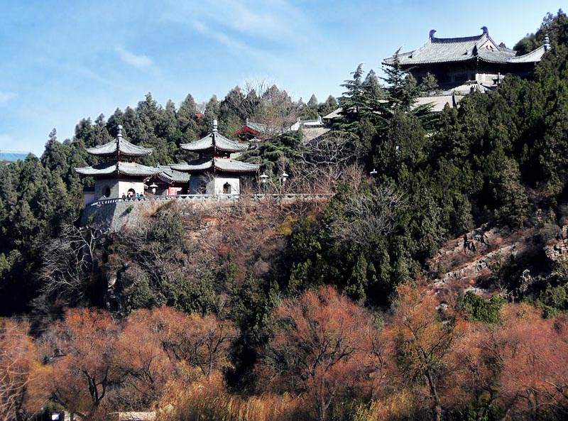 香山寺 (Xiangshan Temple)